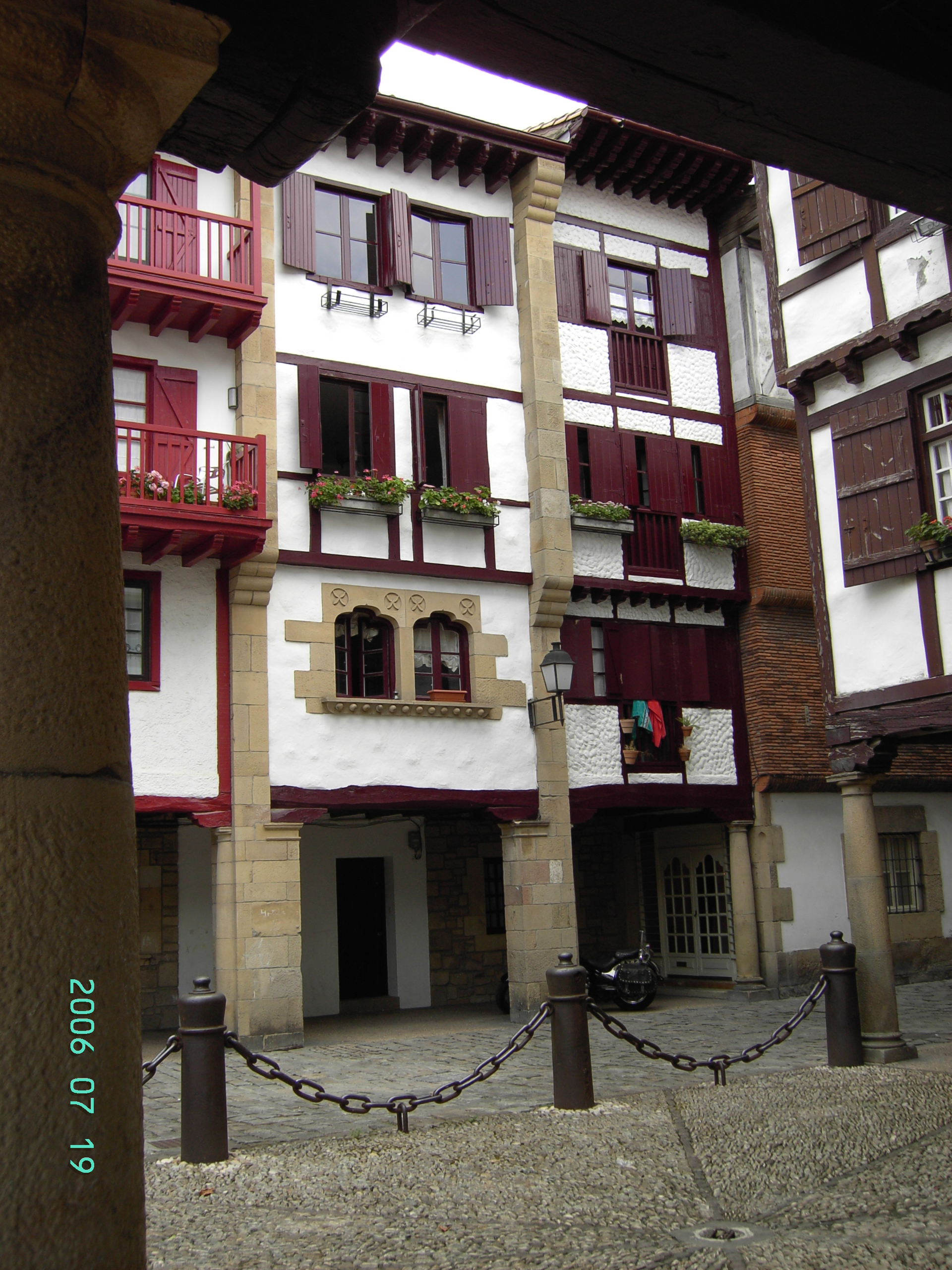 Place du Guipuzcoa, Fontarabie